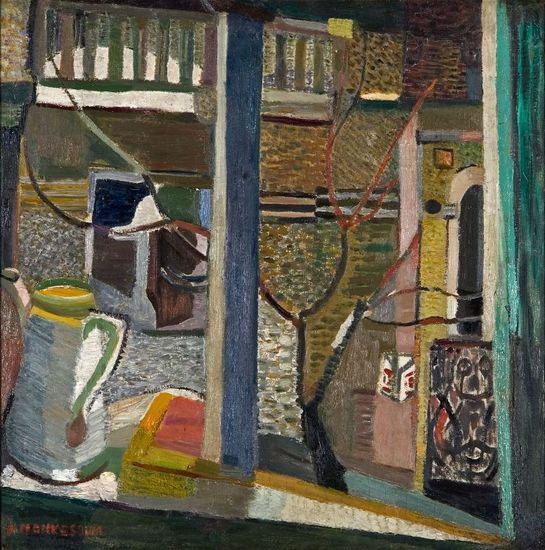 Kompozycja